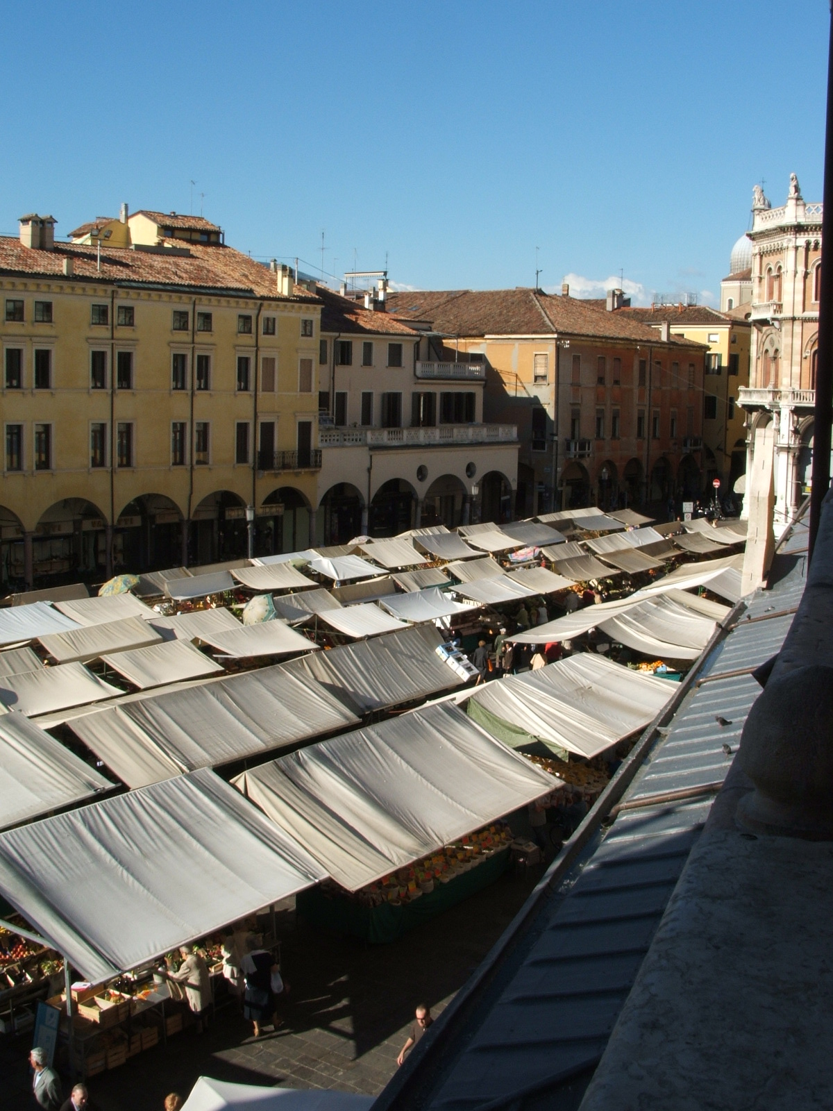 Piazza delle Erbe, a Padova